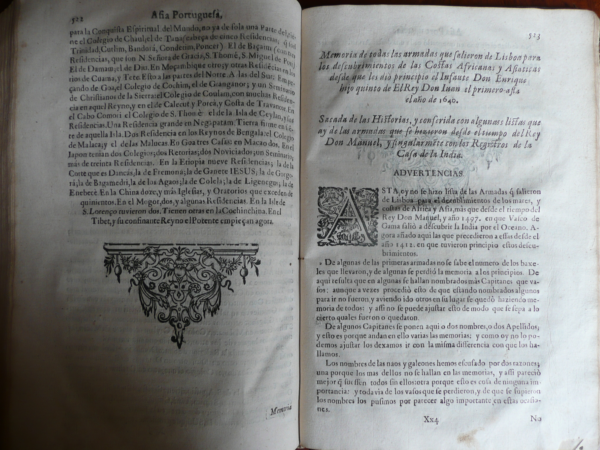 Chronologie des flottes portugaises envoyées en Afrique et en Inde, in Faria y Sousa : Asia portuguesa, parte III, 1675